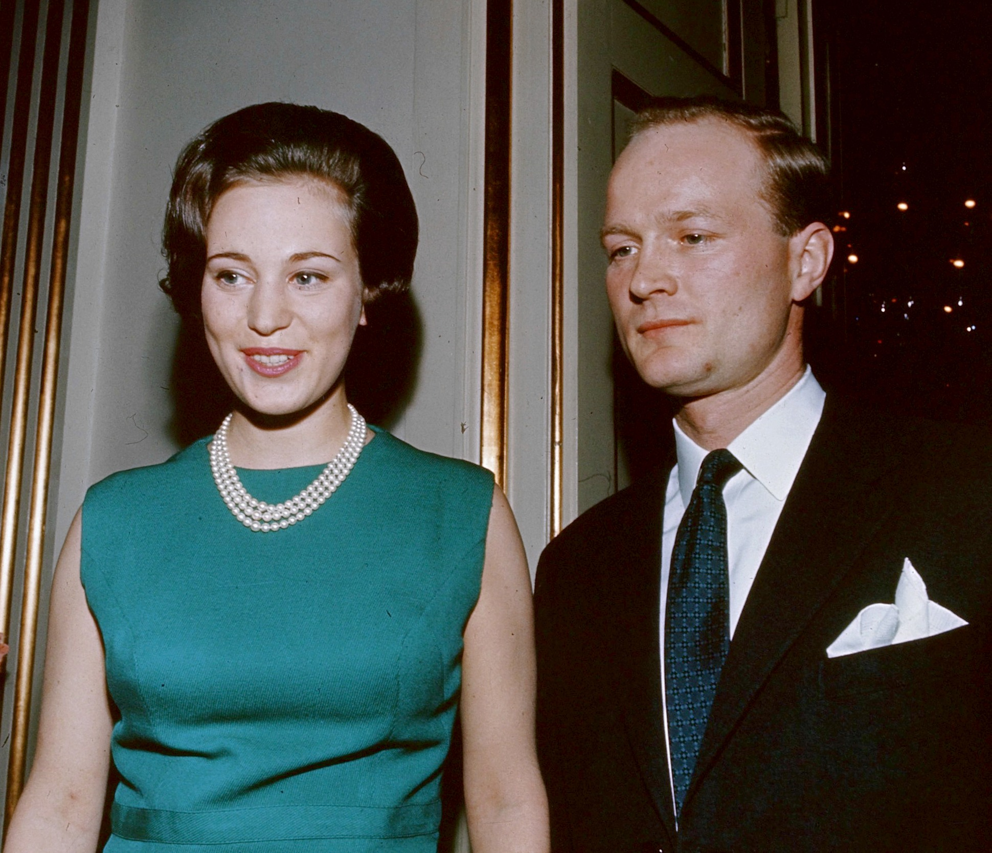 prinses Benedikte van Denemarken samen met haar verloofde prins Richard zu sayn-Wittgenstein-Berleburg; foto genomen in kasteel amalienborg, kopenhagen